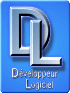 Logo du Titre Professionnel CDI - Concepteur Développeur Informatique